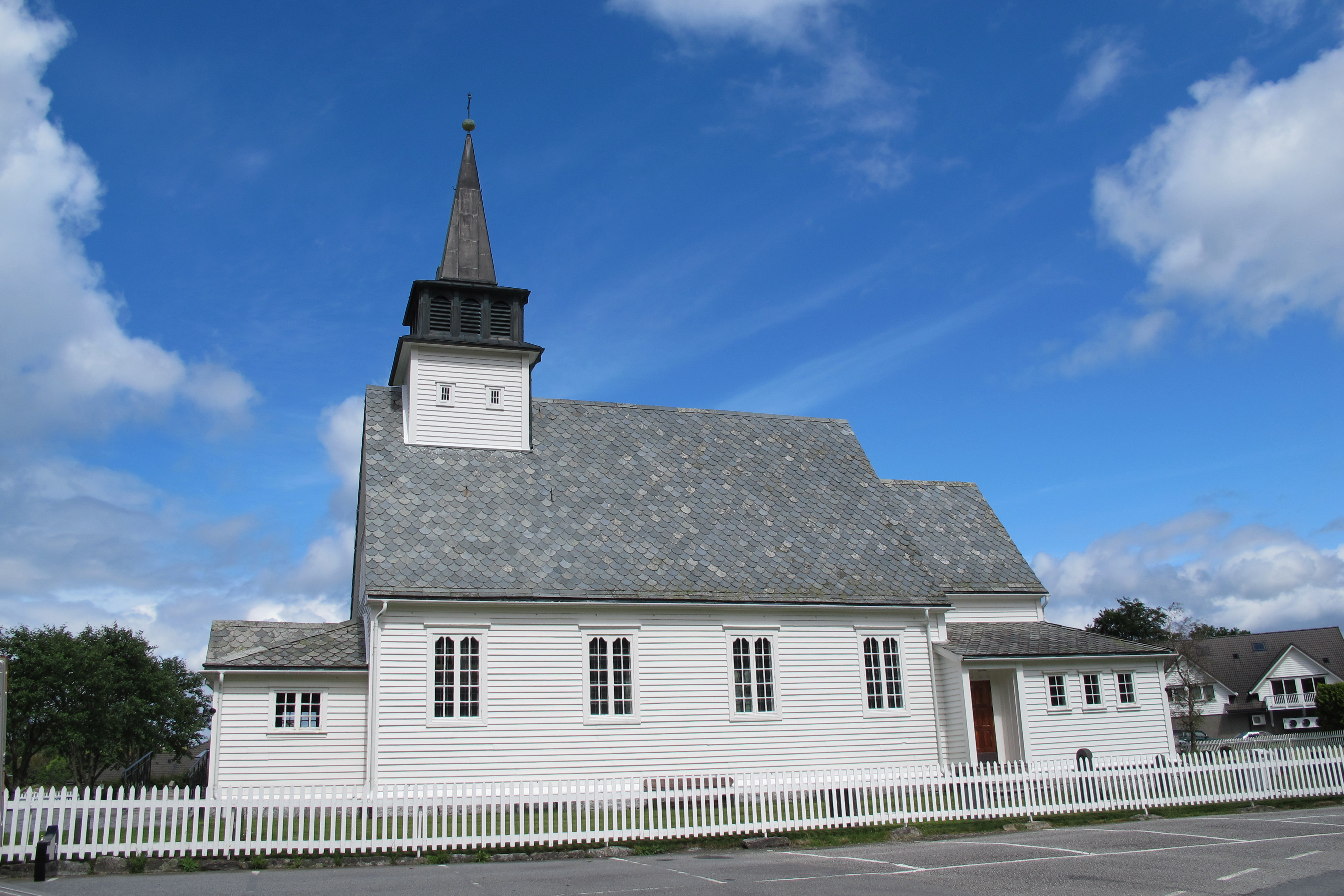 Uskedal kyrkje, juni 2017